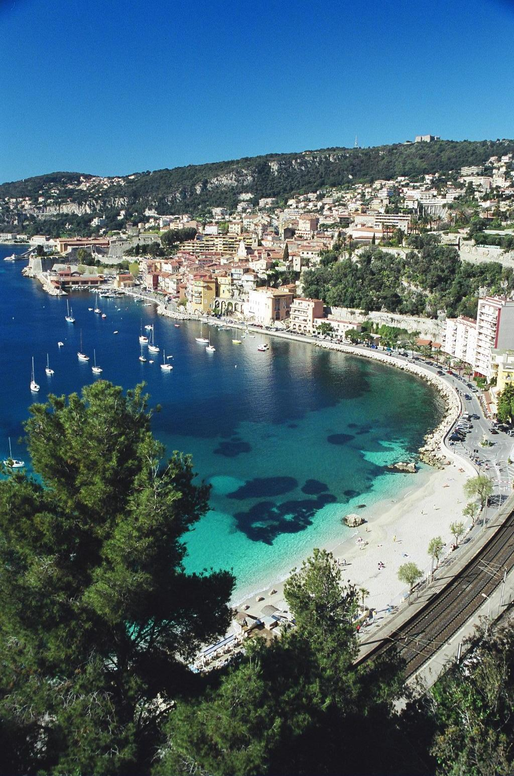 Rade de Villefranche sur mer. Prise en Aout 2006. Auteur de cette image.